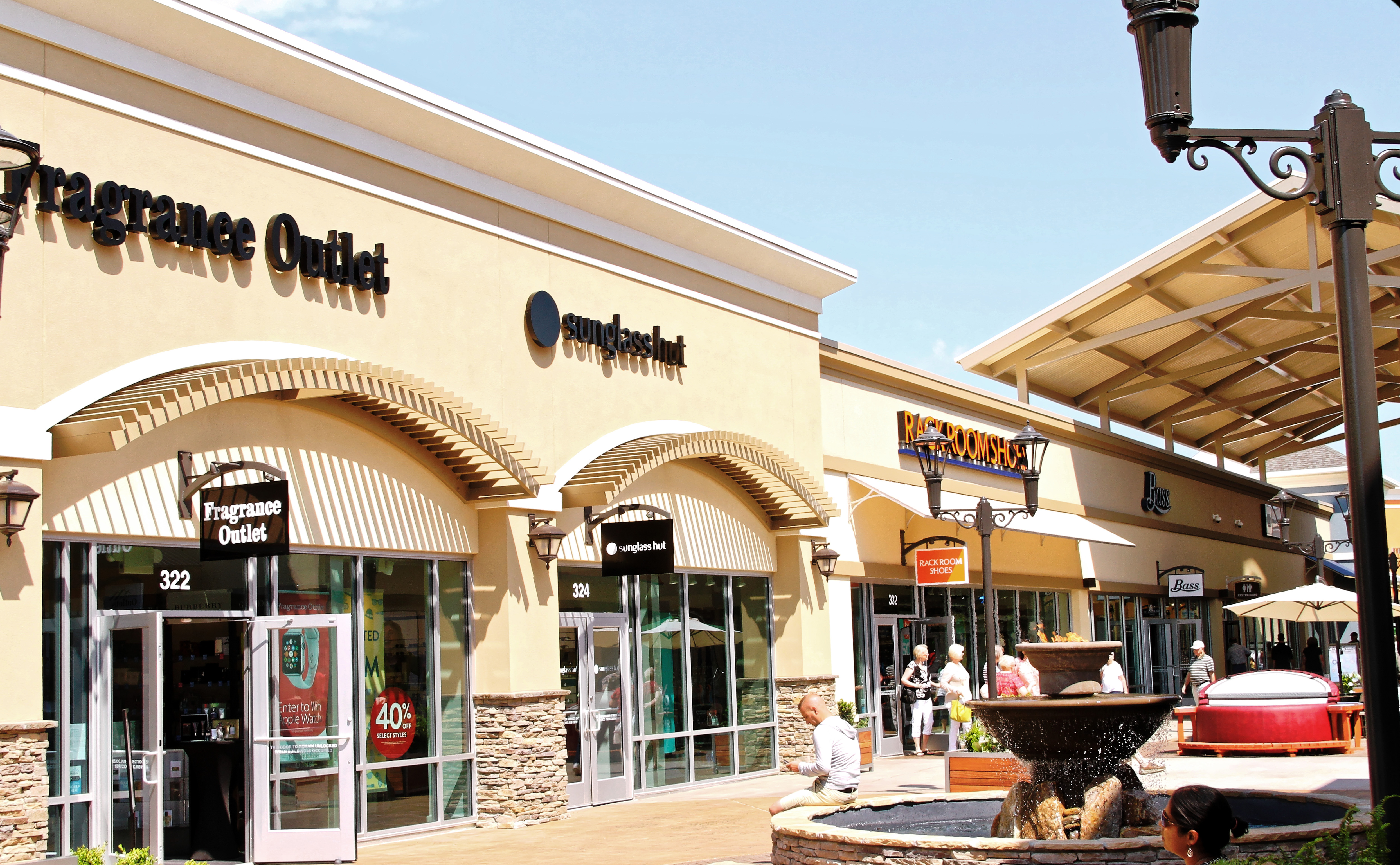 Public Domain